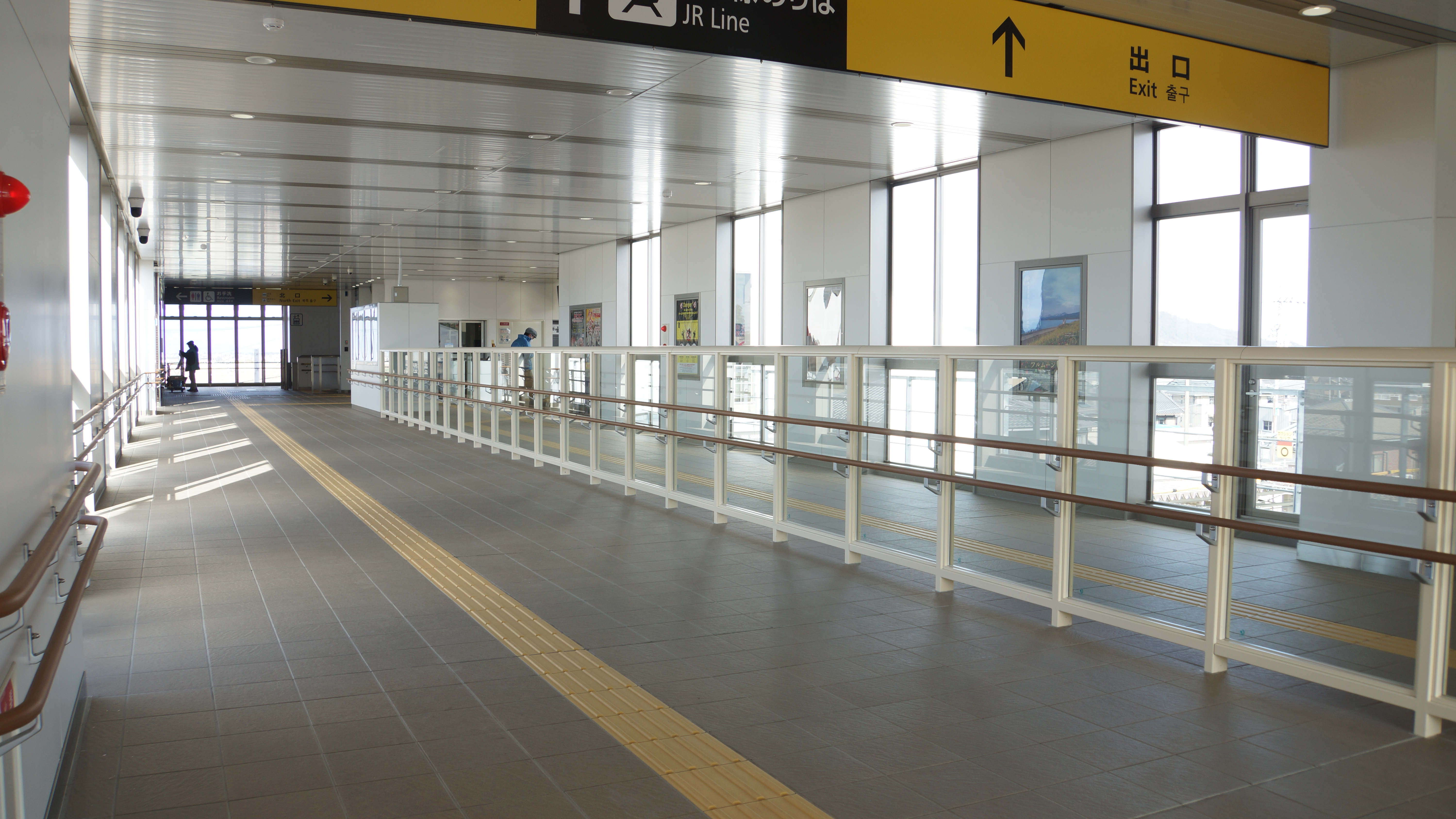 JR篠原駅（滋賀県） 2階自由通路 南側。 2016年1月1日撮影。